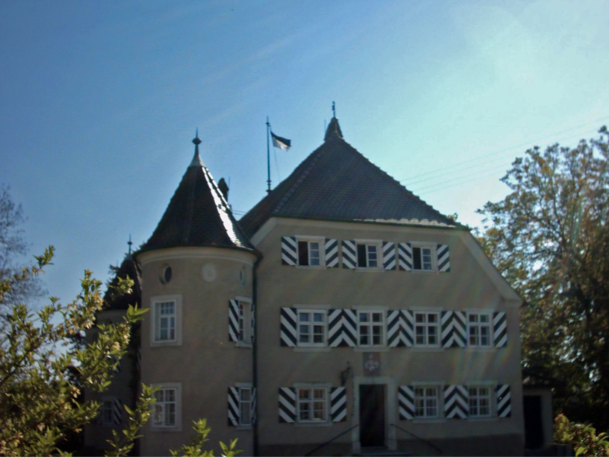 Schloss Tannhausen